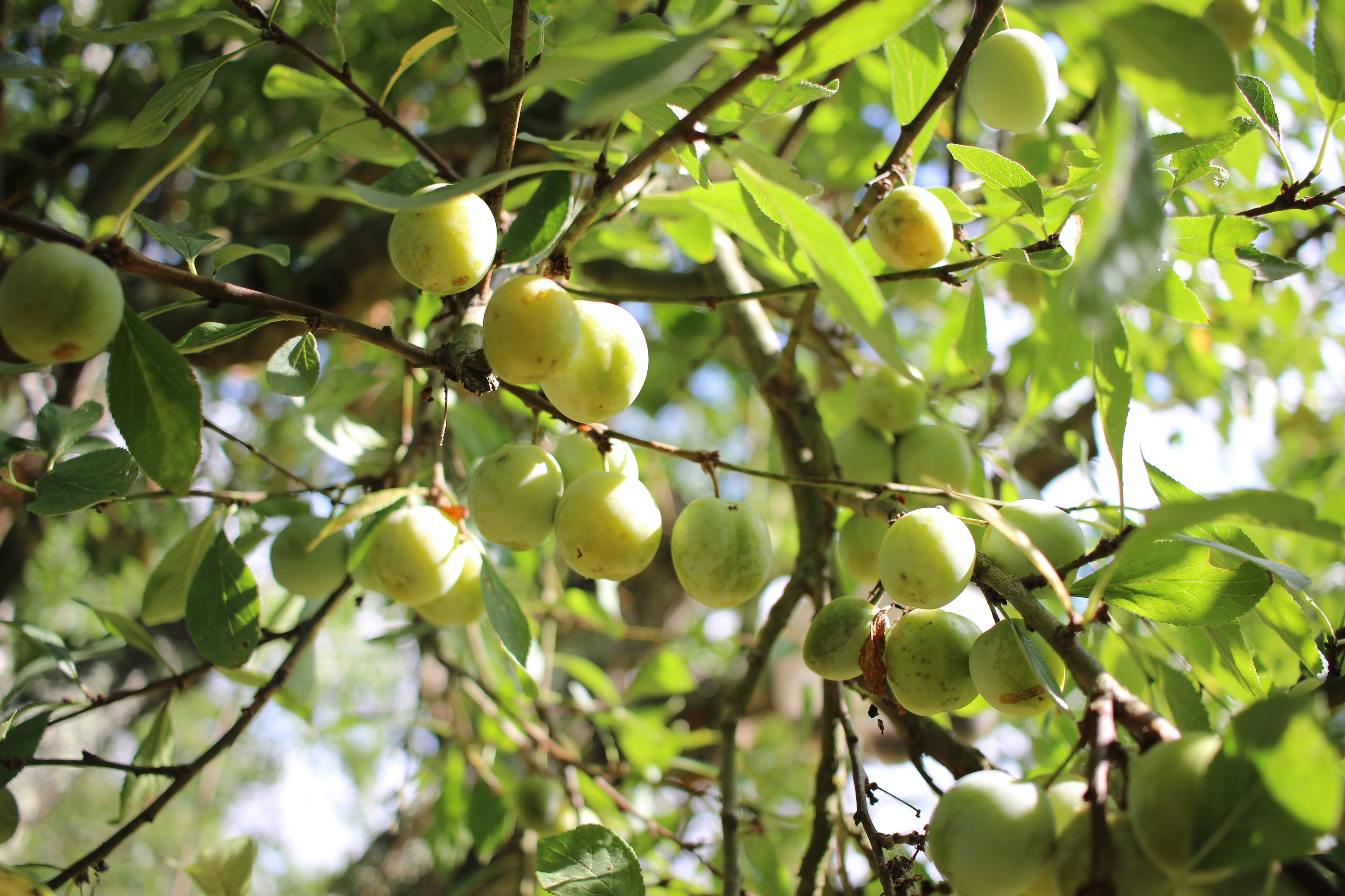 Des mirabelles, pas encore mûres, sur leur branche.